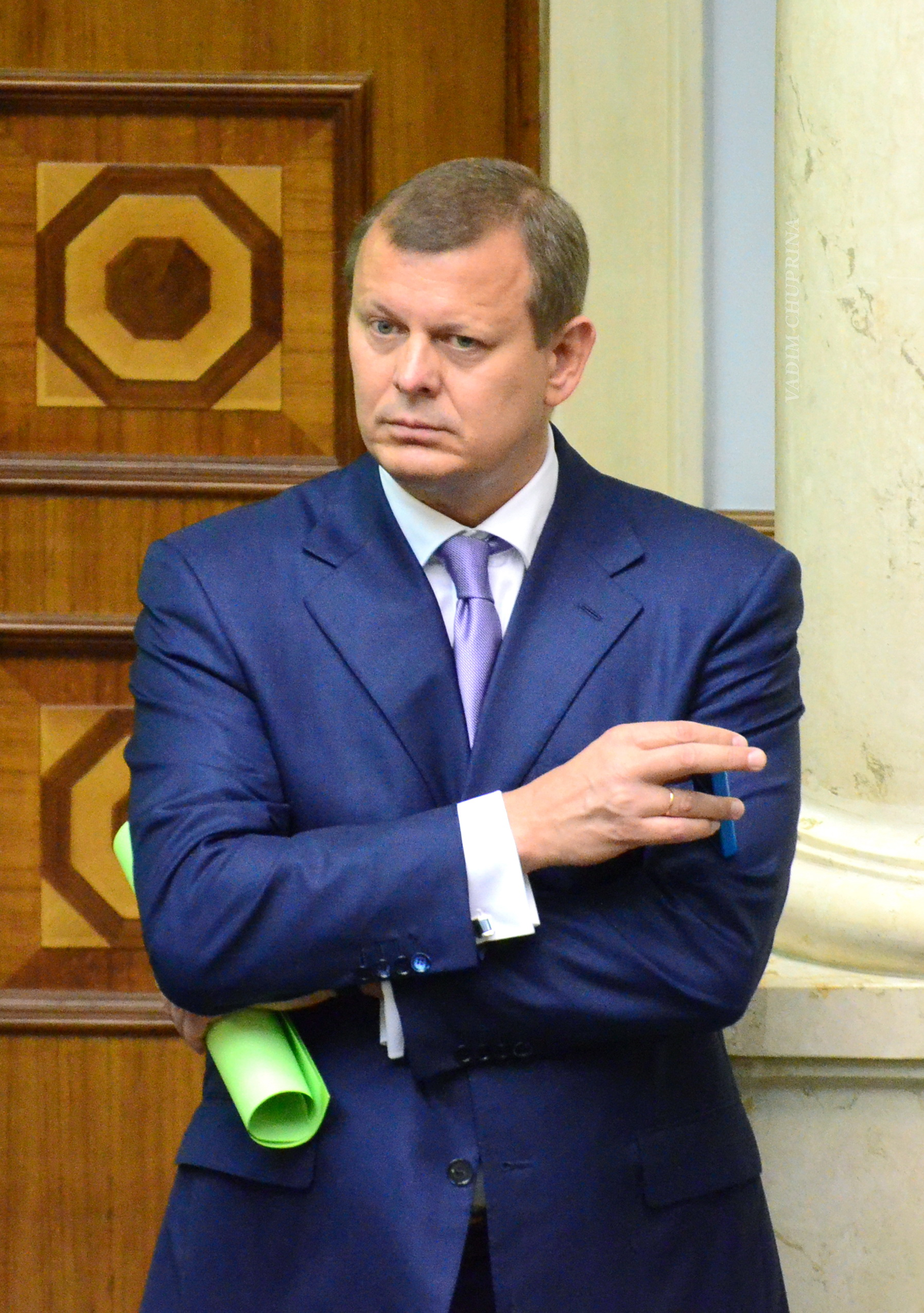 ВЕРХОВНАЯ РАДА УКРАИНЫ 2016 , фото Вадим Чуприна